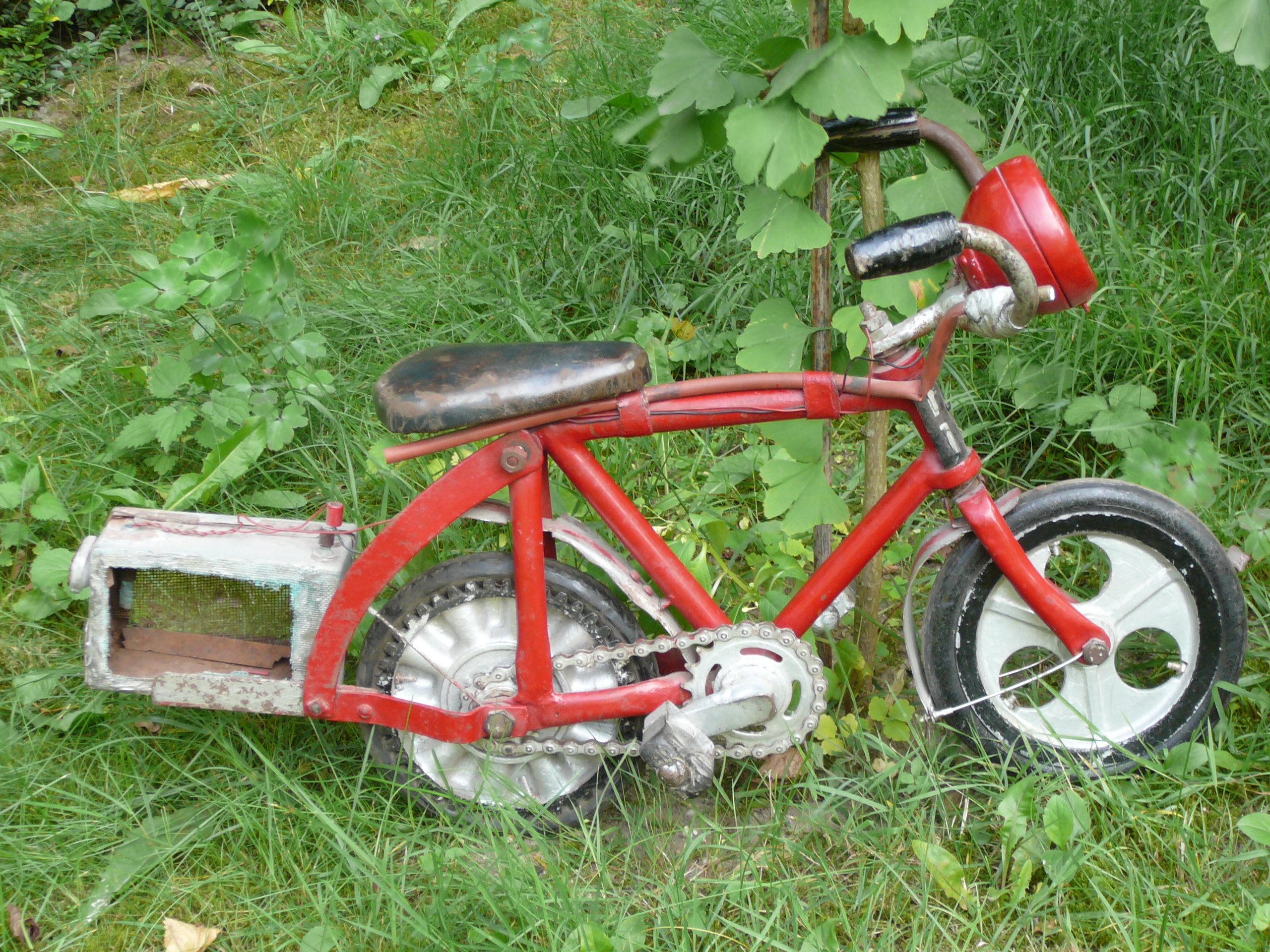 Kleinstes Rad des Radartisten Paul Z'dun (1904-1981), Lenkerhöhe 40 Zentimeter